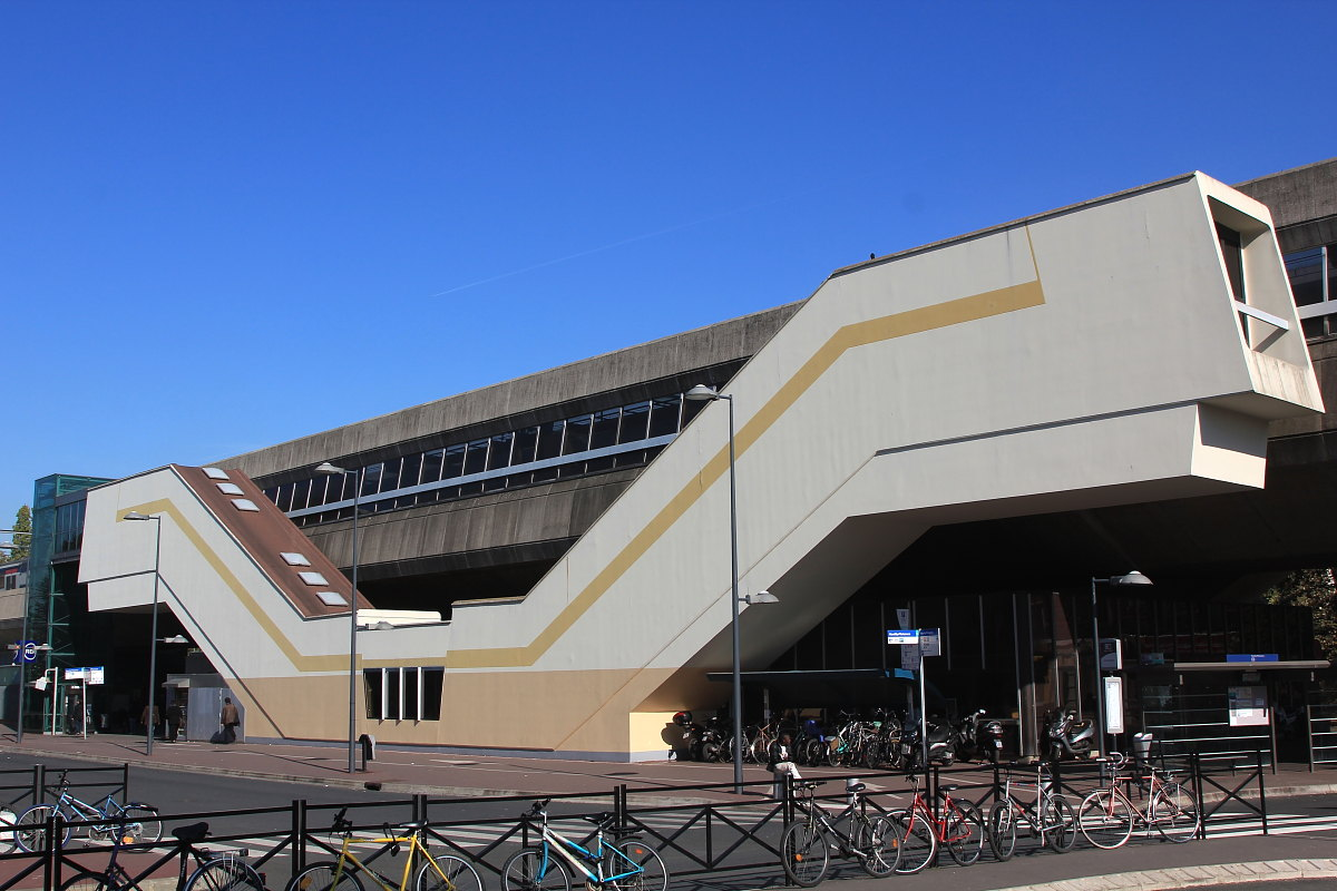 Les accès aux quais du bâtiment voyageurs, vus depuis la voie publique.